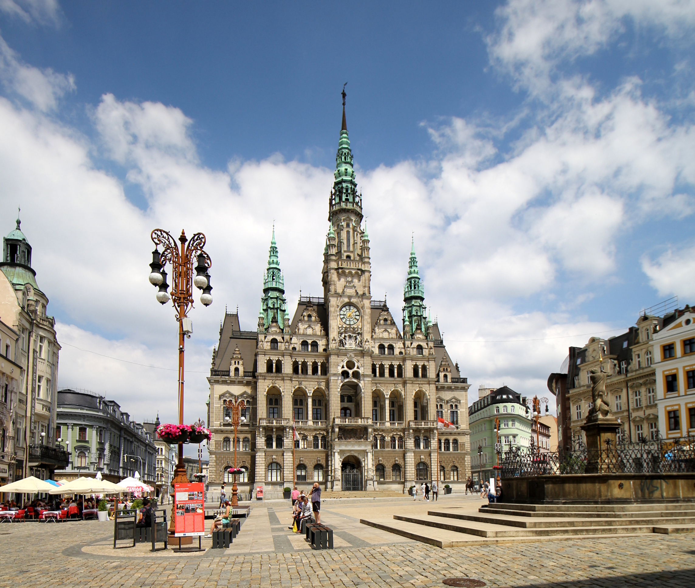 Liberecká radnice